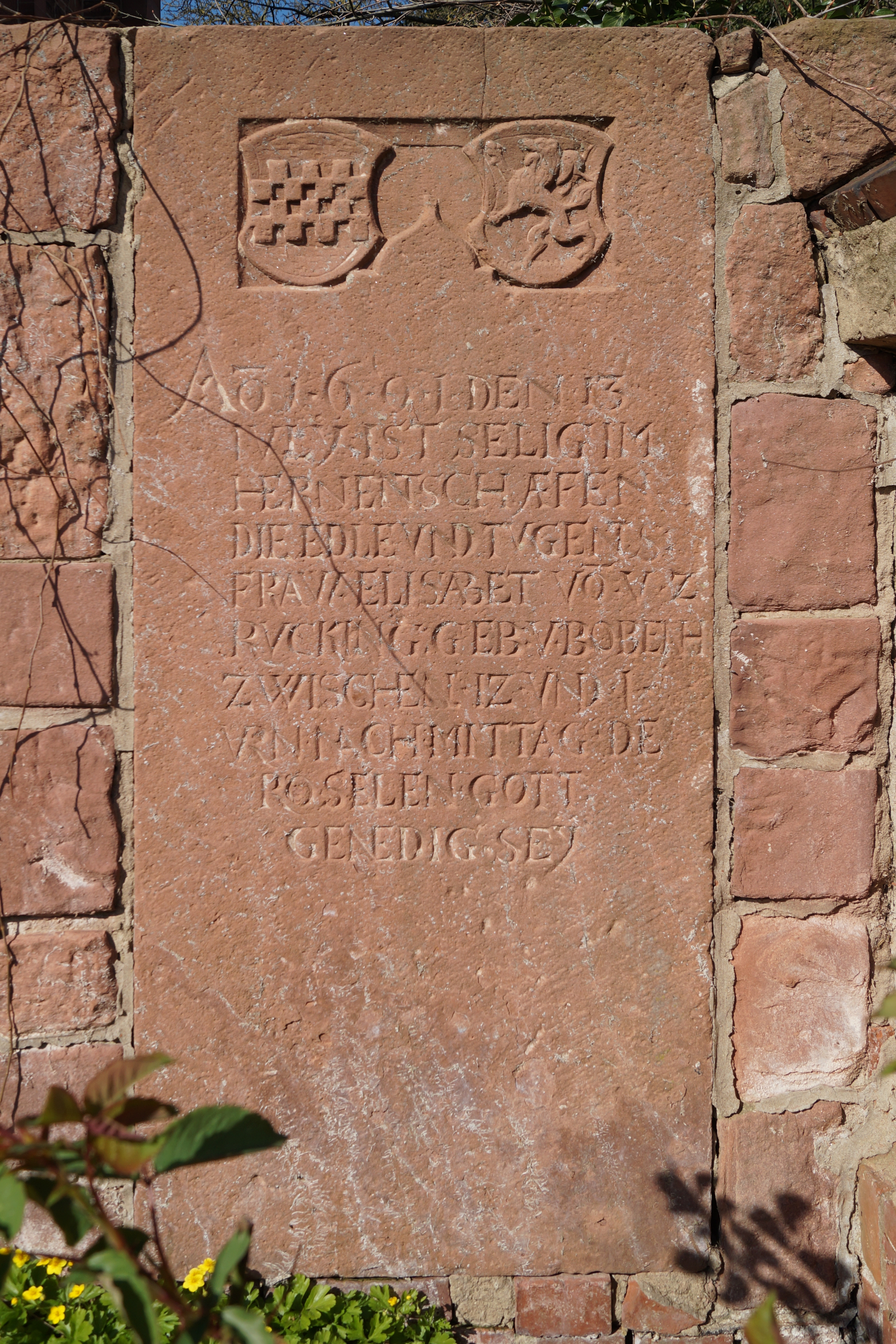 Grabplatte der Elisabet von Rückingen (gestorben 1601) an der Evangelischen Kirche in Erlensee-Rückingen, Hessen.